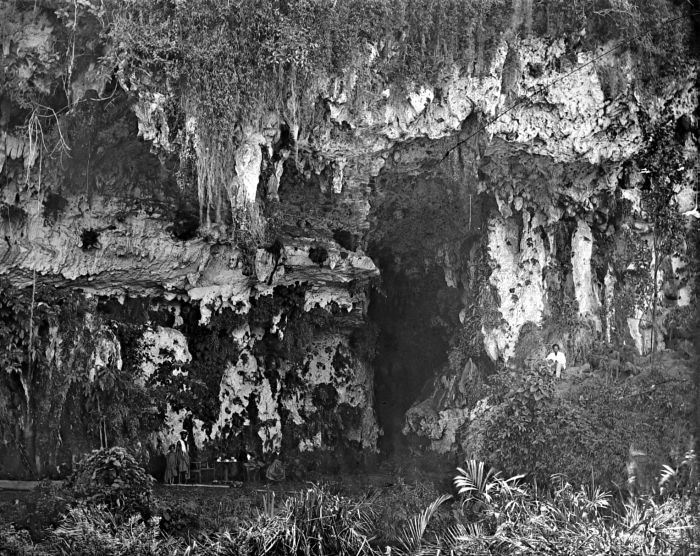 Negatief. Grot van Bungoro